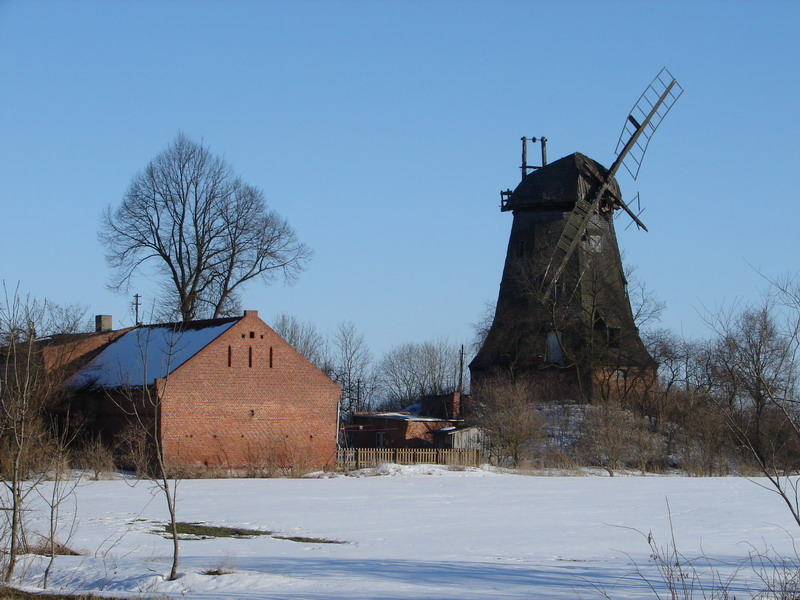 Wiatrak w Palczewie - strona zachodnia